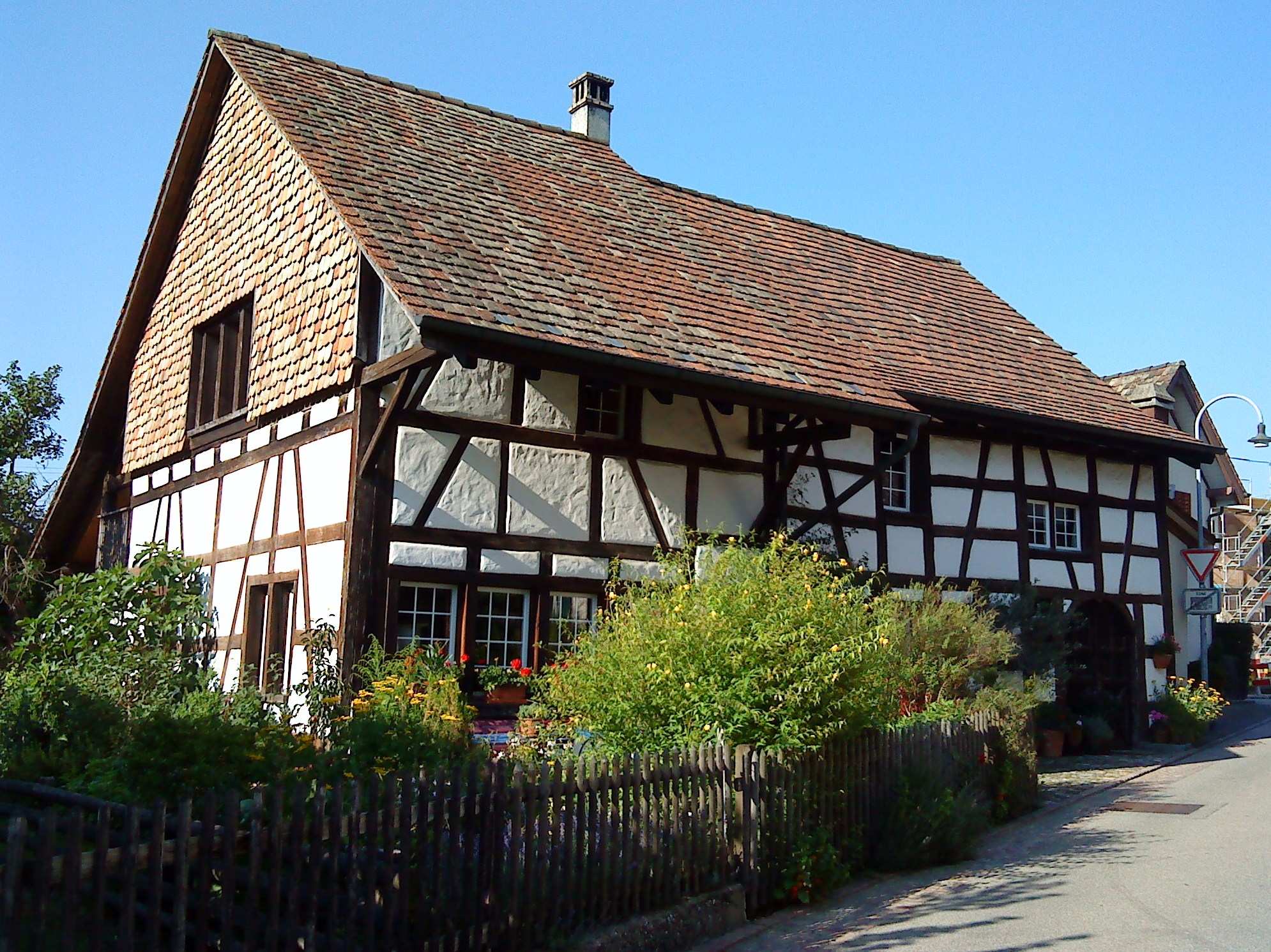 Ehemaliges Bauernhaus an der Hintergasse in Buchthalen, einem Quartier von Schaffhausen.